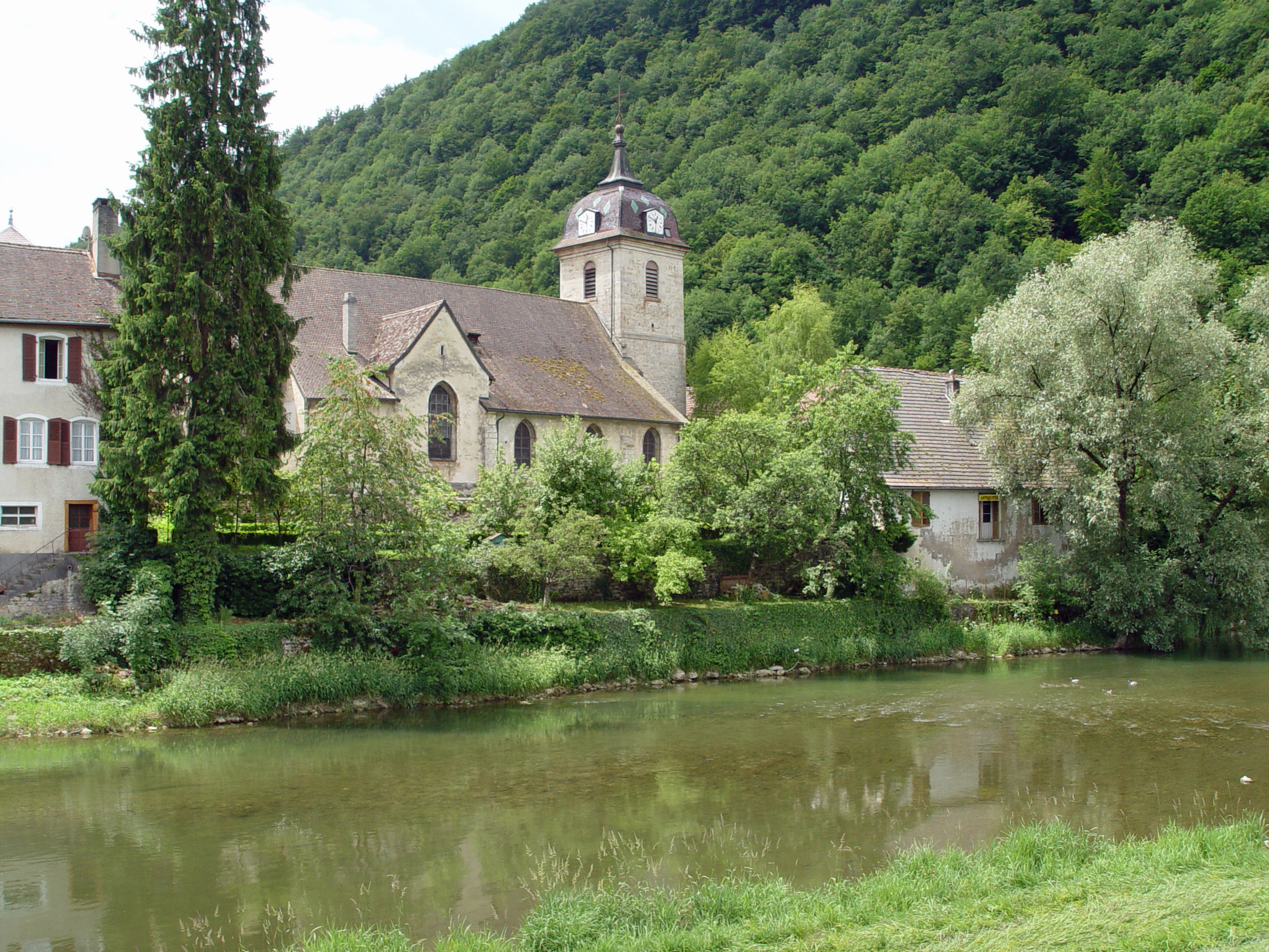 Kirche in Saint-Hippolyt, in welcher das Turiner Grabtuch aufbewahrt wurde